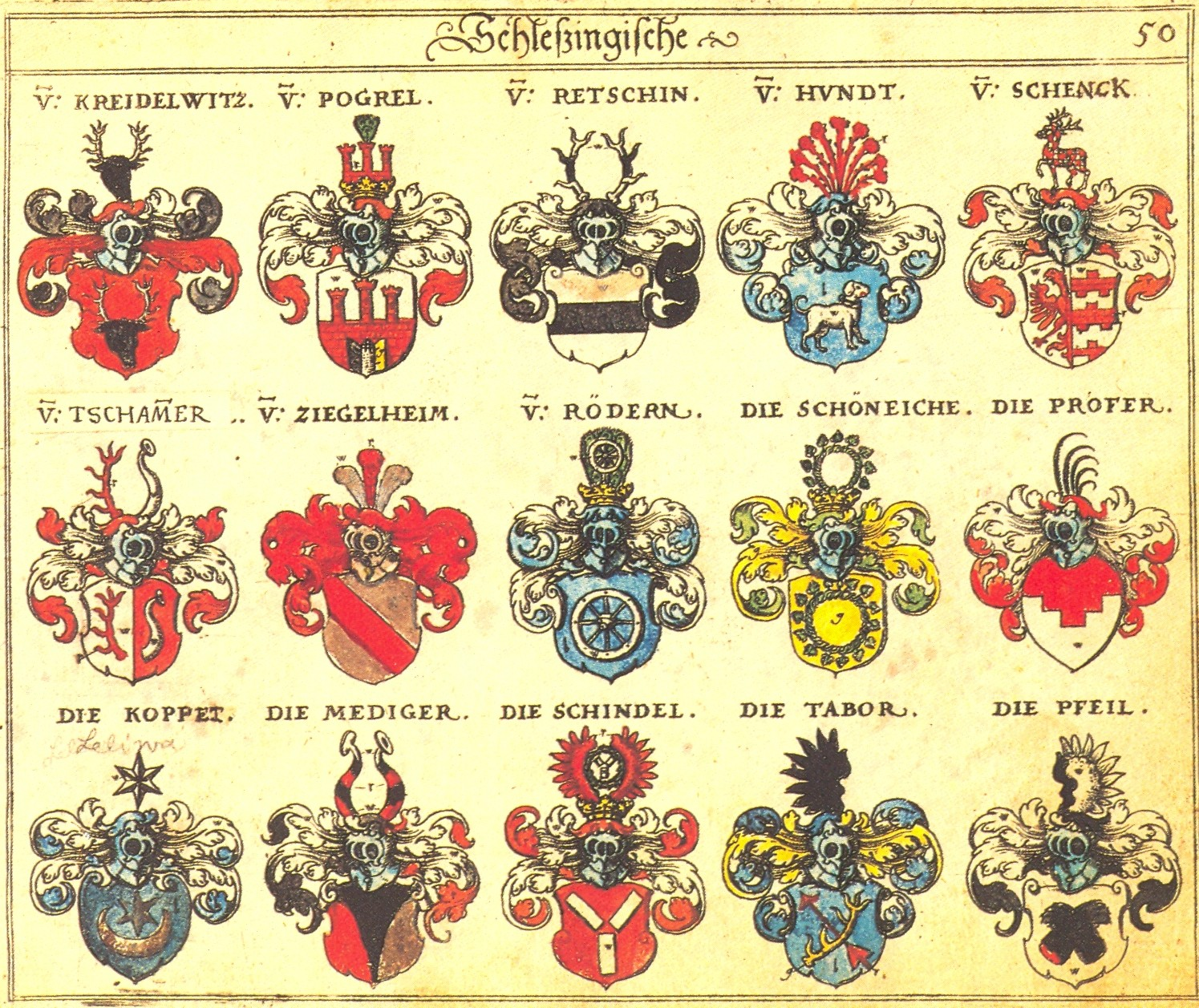 Johann Siebmacher: New Wappenbuch eingescannt aus: Horst Appuhn (Hrsg.), Johann Siebmachers Wappenbuch. Die bibliophilen Taschenbücher 538, 2. verb. Aufl , Dortmund 1989 Schlesische Blatt 50